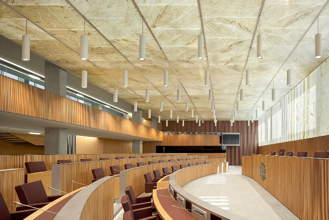 Interior de la seu del Consell General d'Andorra